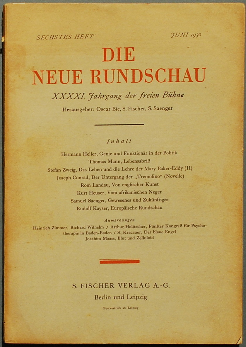 Mann, Thomas: Lebensabriß. In: Die Neue Rundschau, 6. Heft Juni 1930, 41. Jg., S. 732 – 769, Potempa G 445.1. Mit mehreren Druck- und Namensfehlern. Entschuldigung für die Druckfehler in: Die Neue Rundschau, 7. Heft Juli 1930, S. 144.